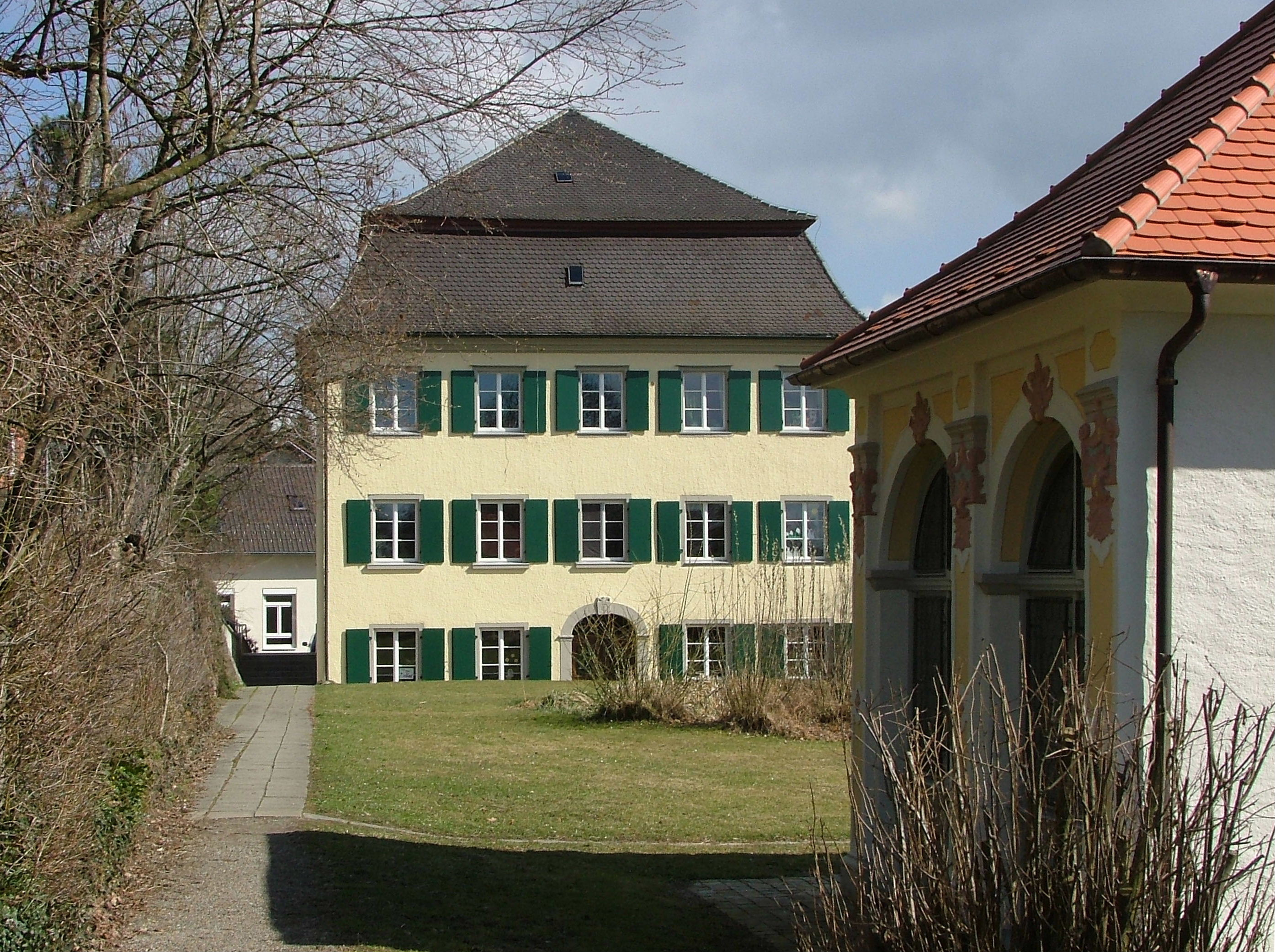 Schloss Hummelsberg, ein Schlösschen der Ulmer Patrizierfamilie Furttenbach in Leutkirch in Allgäu, heute Stiftung St. Anna